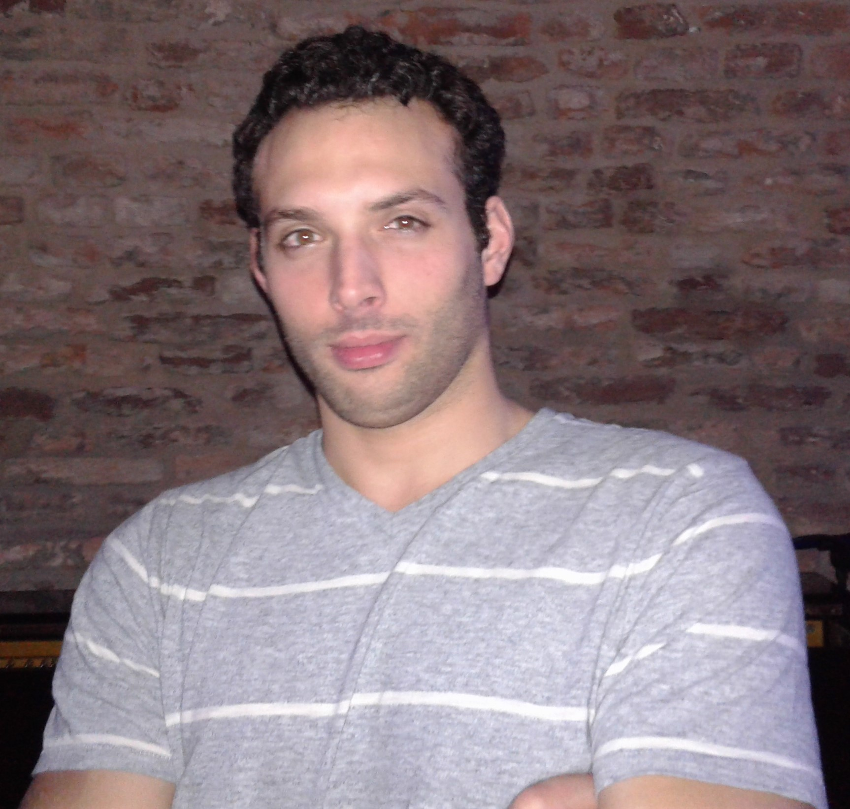 Mirco Di Tora, famoso nuotatore italiano